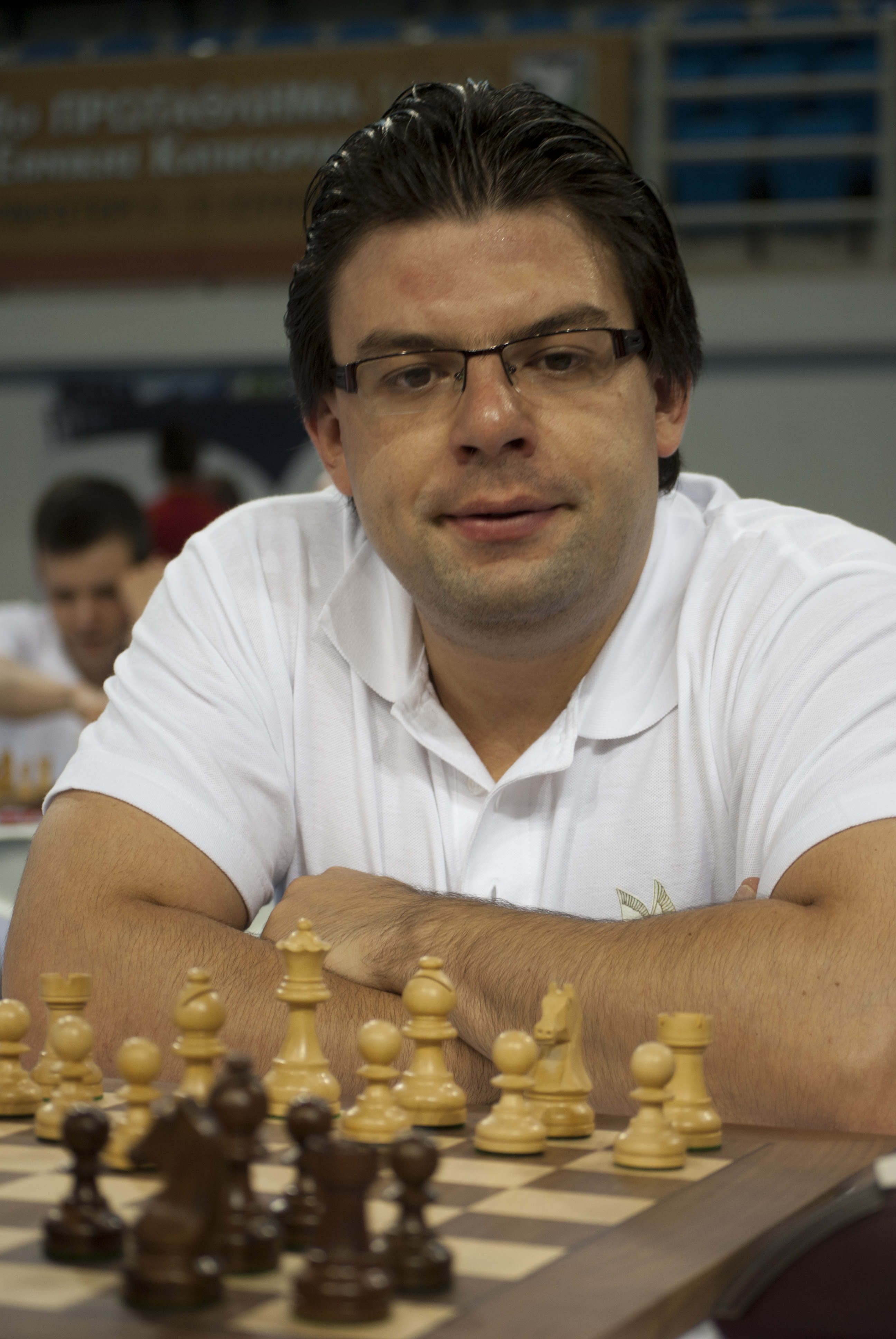 GM Stelios Halkias